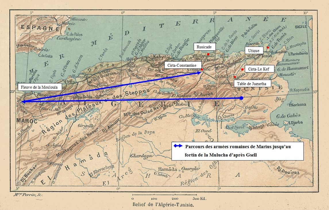 Parcours des armées romaines de Marius en Numidie pendant les guerres de Jugurtha suivant la version de Gsell